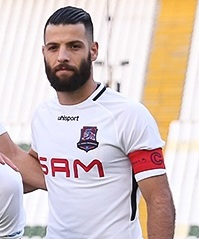 مازِرونی: نساجی فوتوال تیم